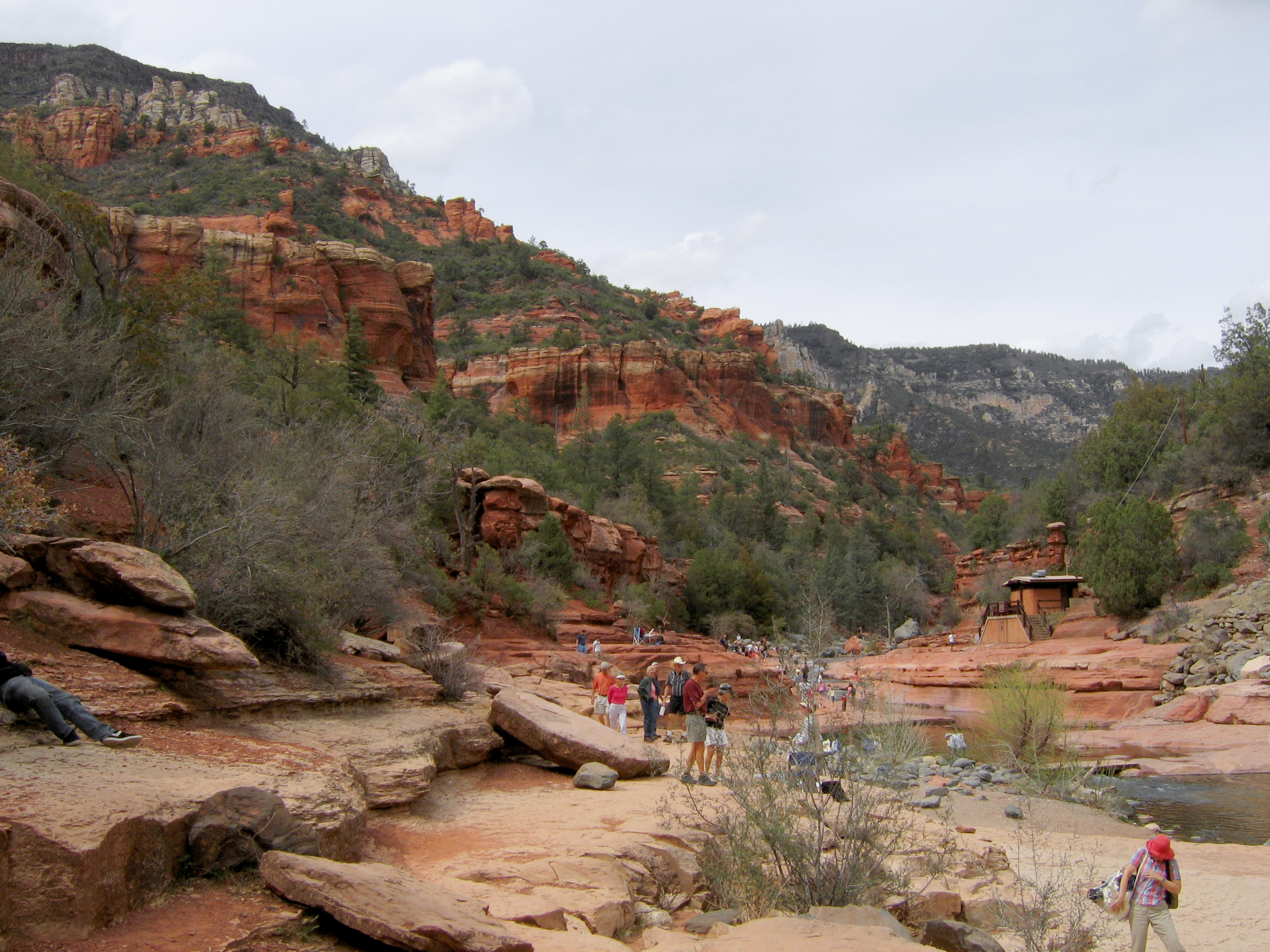 Slide Rock State Park, Arizona